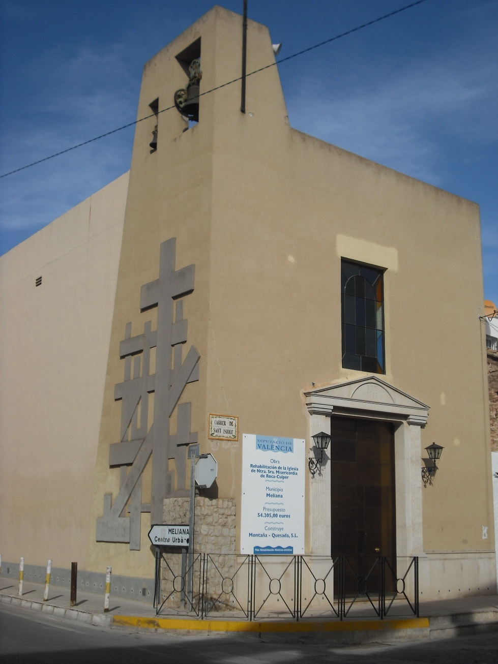 Iglesia de la pedanía de Roca (Meliana)